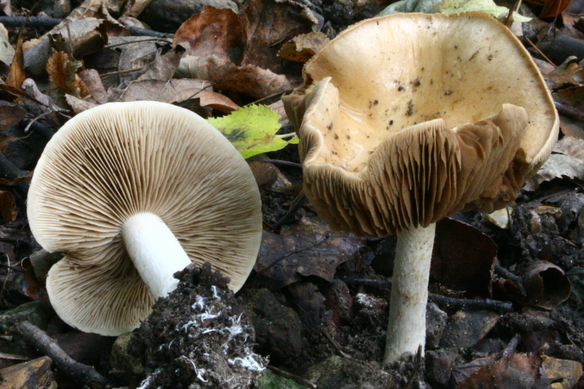 Hebeloma crustuliniforme in a forest near Paris, France.